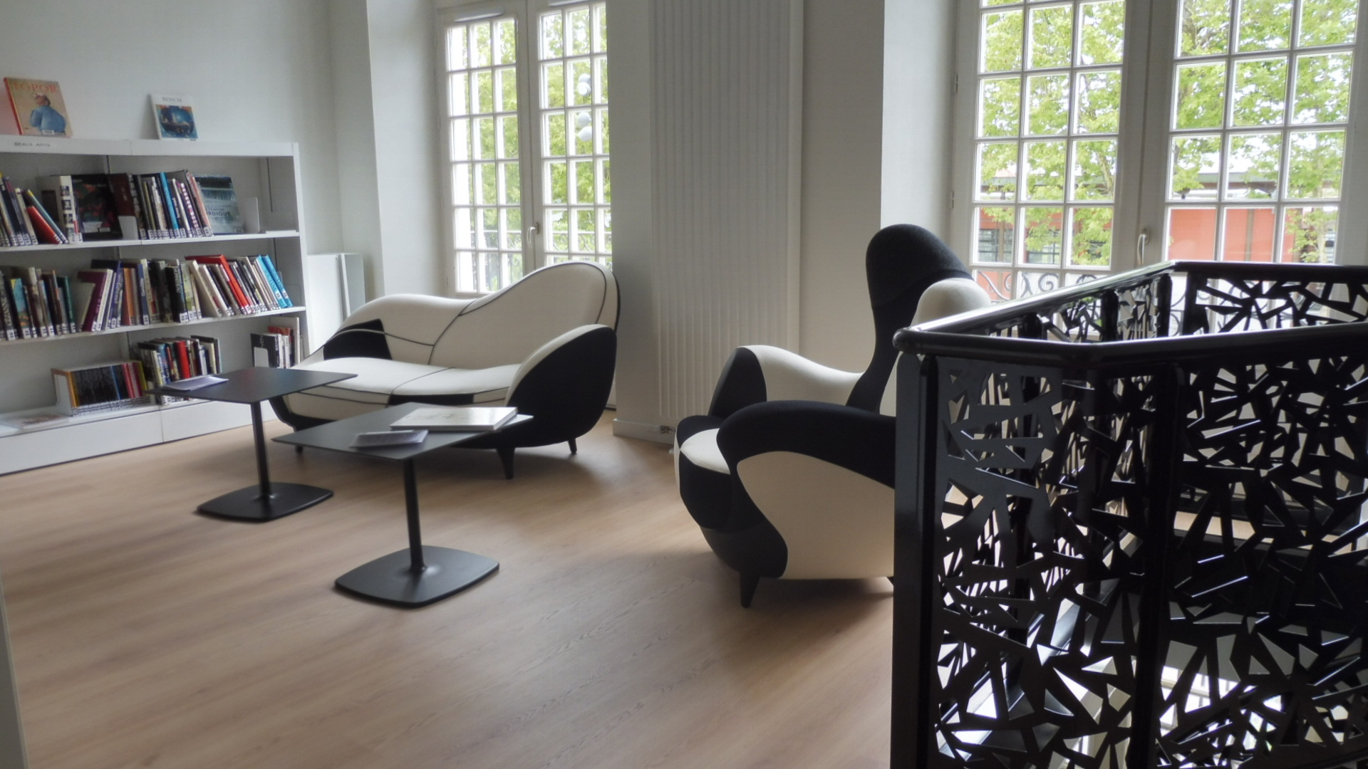 La Teste-de-Buch, Hôtel Caupos restauré ː La Centrale, bibliothèque hybride.